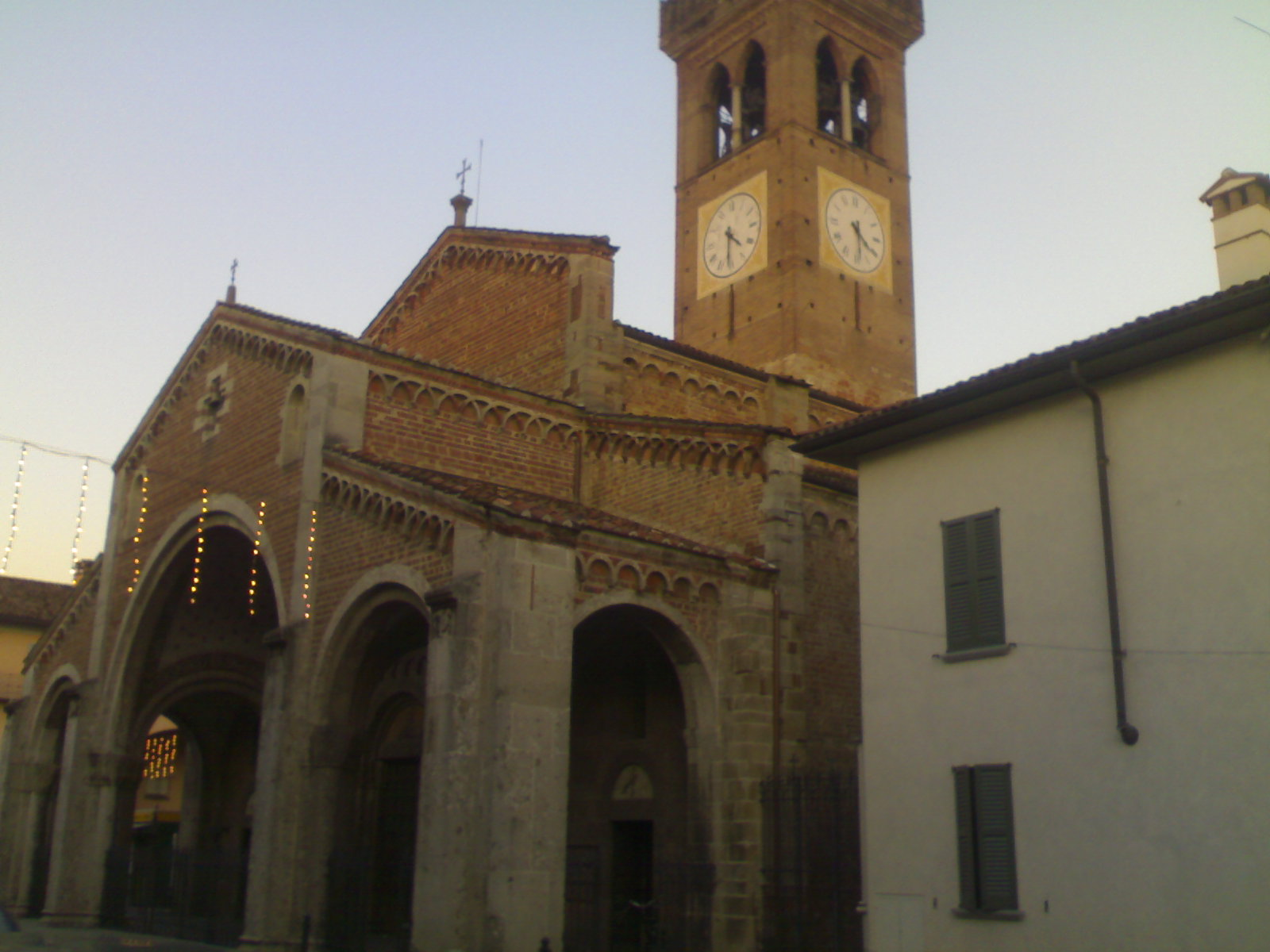 Basilica di S.Sigismondo a Rivolta d'Adda